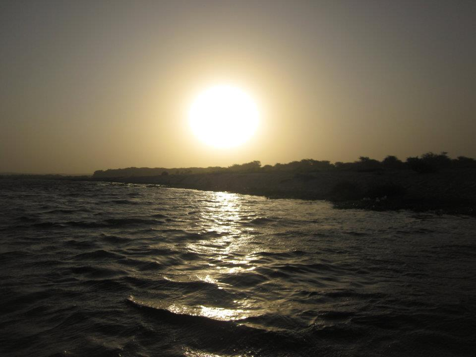 sullana